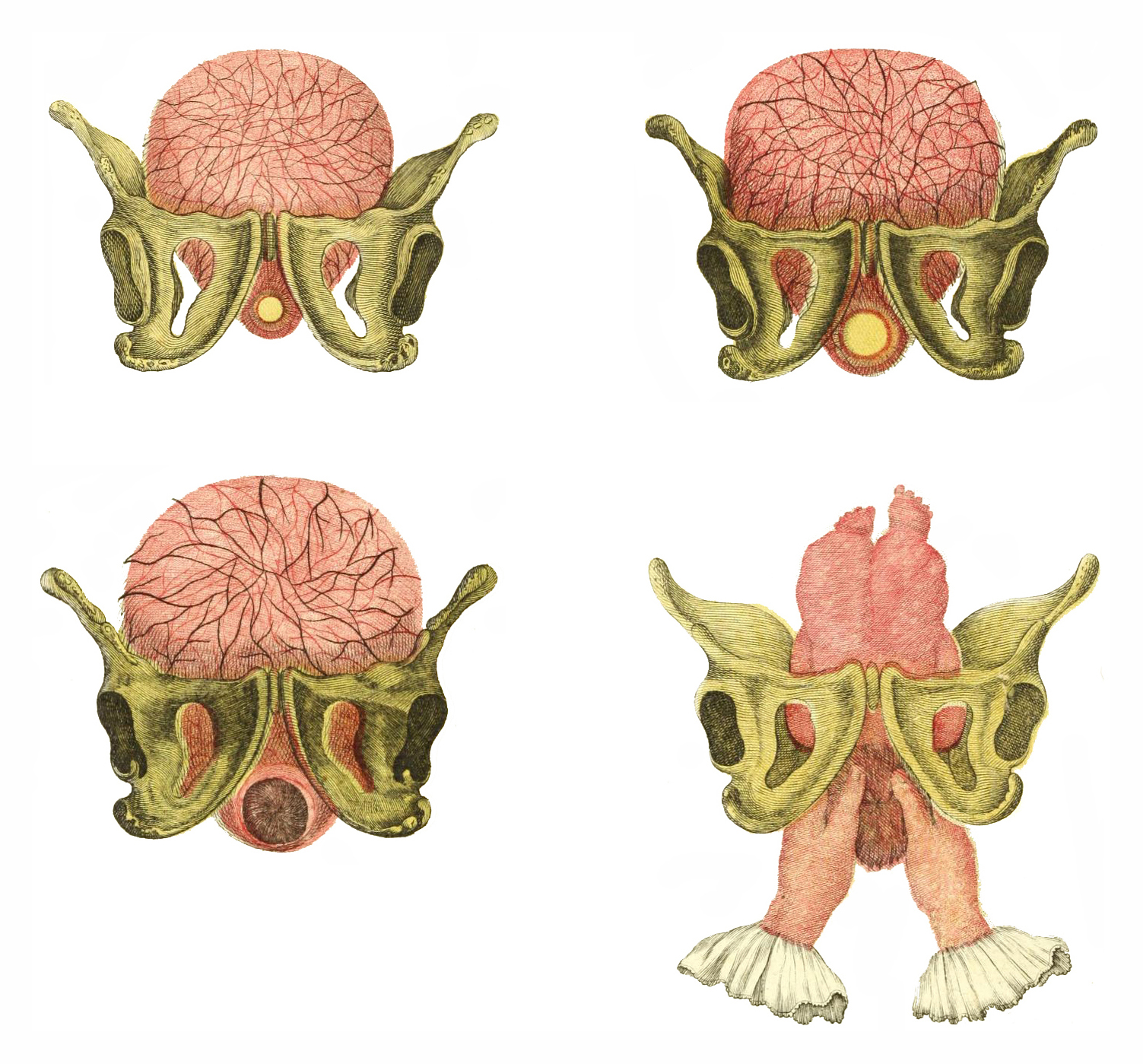 Abbildungen